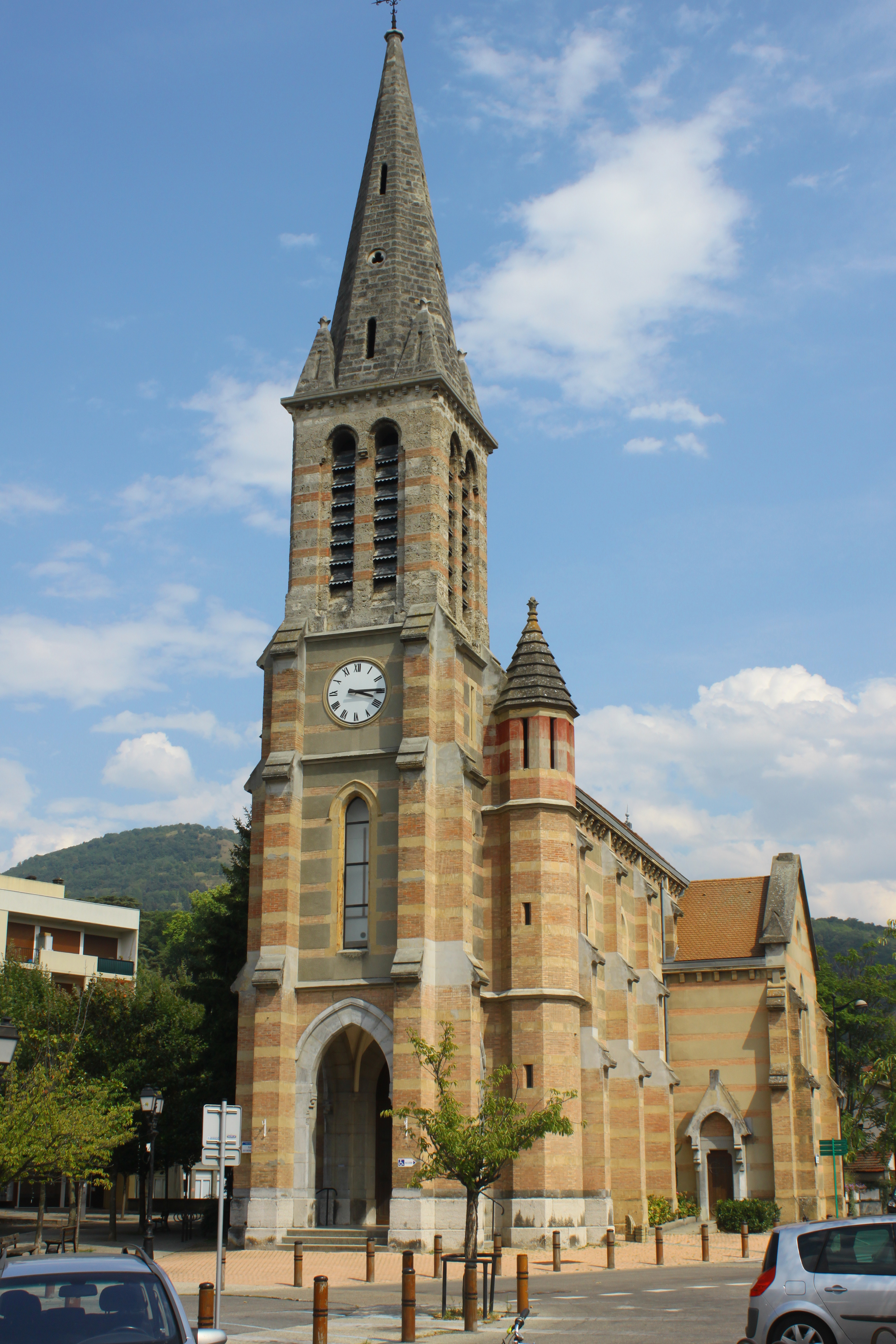 L'Église Saint-Christophe d'Eybens en Isère.